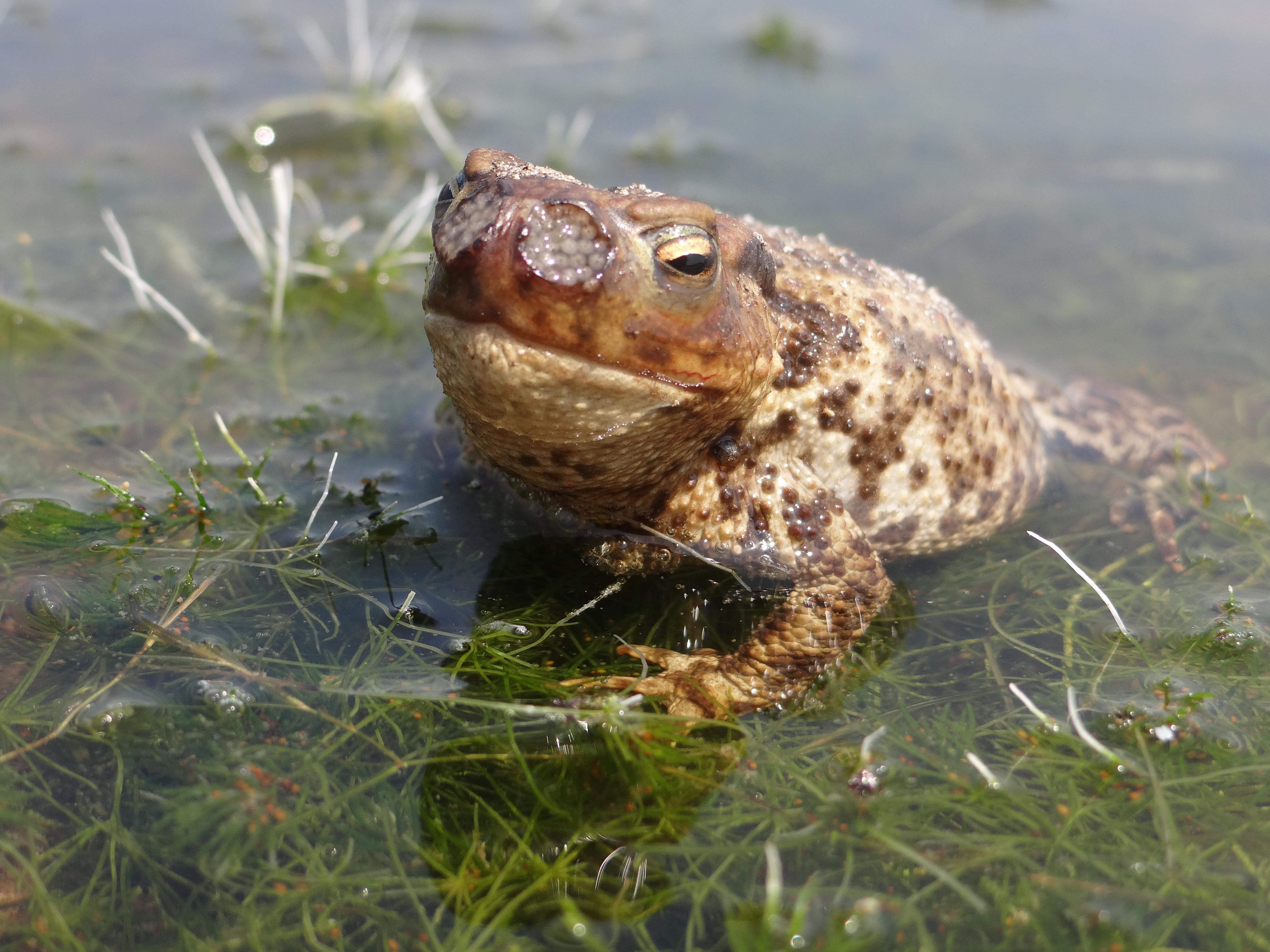 Crapaud commun (Bufo bufo) parasité par Lucilia bufonivora (3) - Baie de Somme